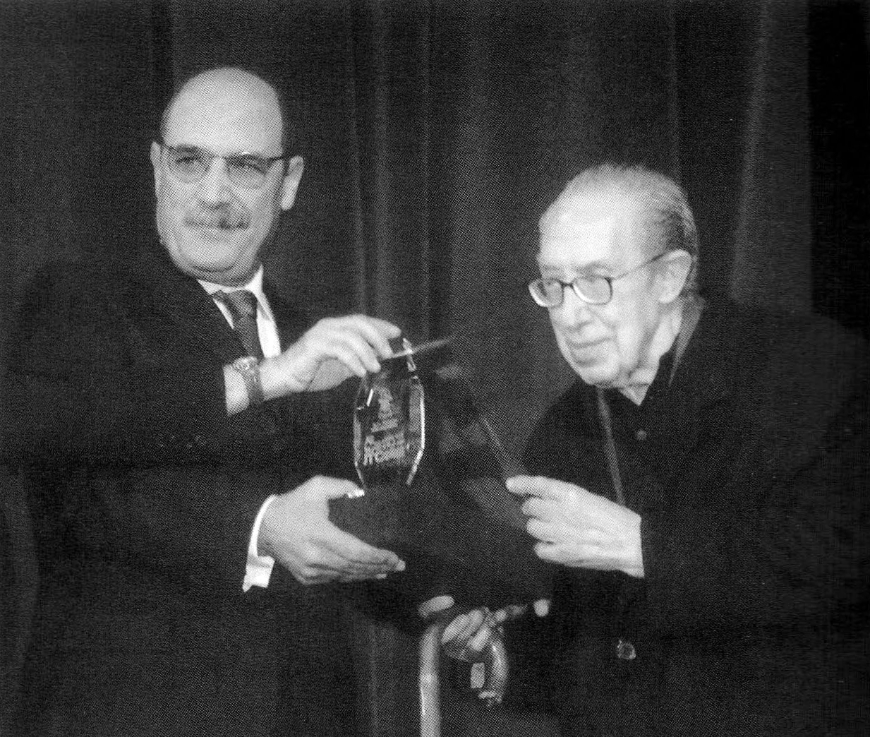 Si Taoufik Boughedir honoré du prix du "Centenaire du théâtre tunisien" par Monsieur Raouf Basti, Ministre de la Culture et de la Sauvegarde du Patrimoine,au Théâtre de la Ville de Tunis.